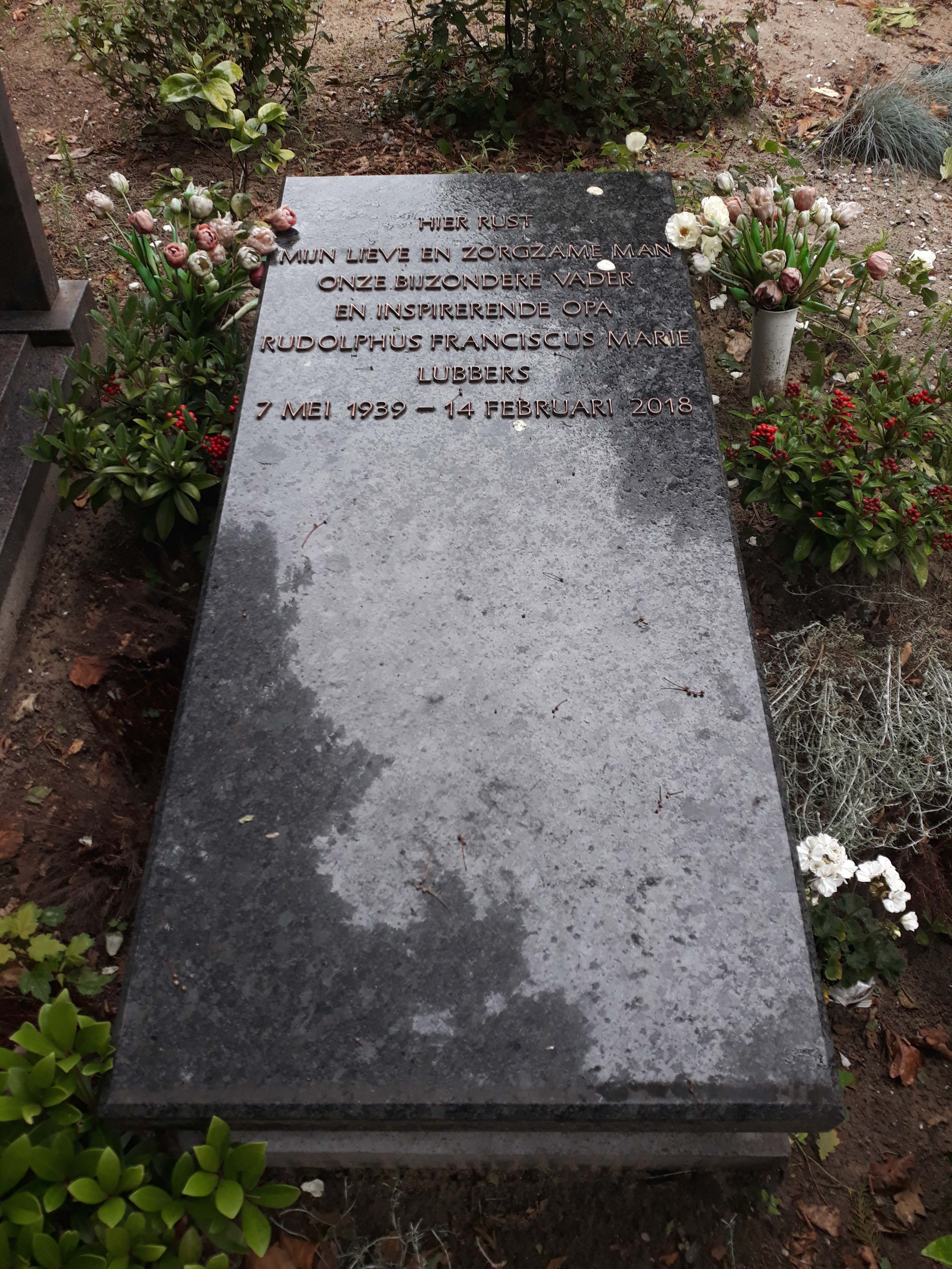 Das Grab des niederlänischen Politikers Ruud Lubbers auf dem katholischen Laurentius-Friedhof in Rotterdam.